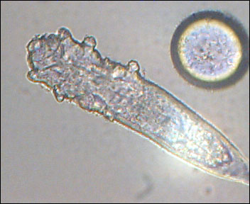 Haarbalgmilbe im Durchlichtmikroskop